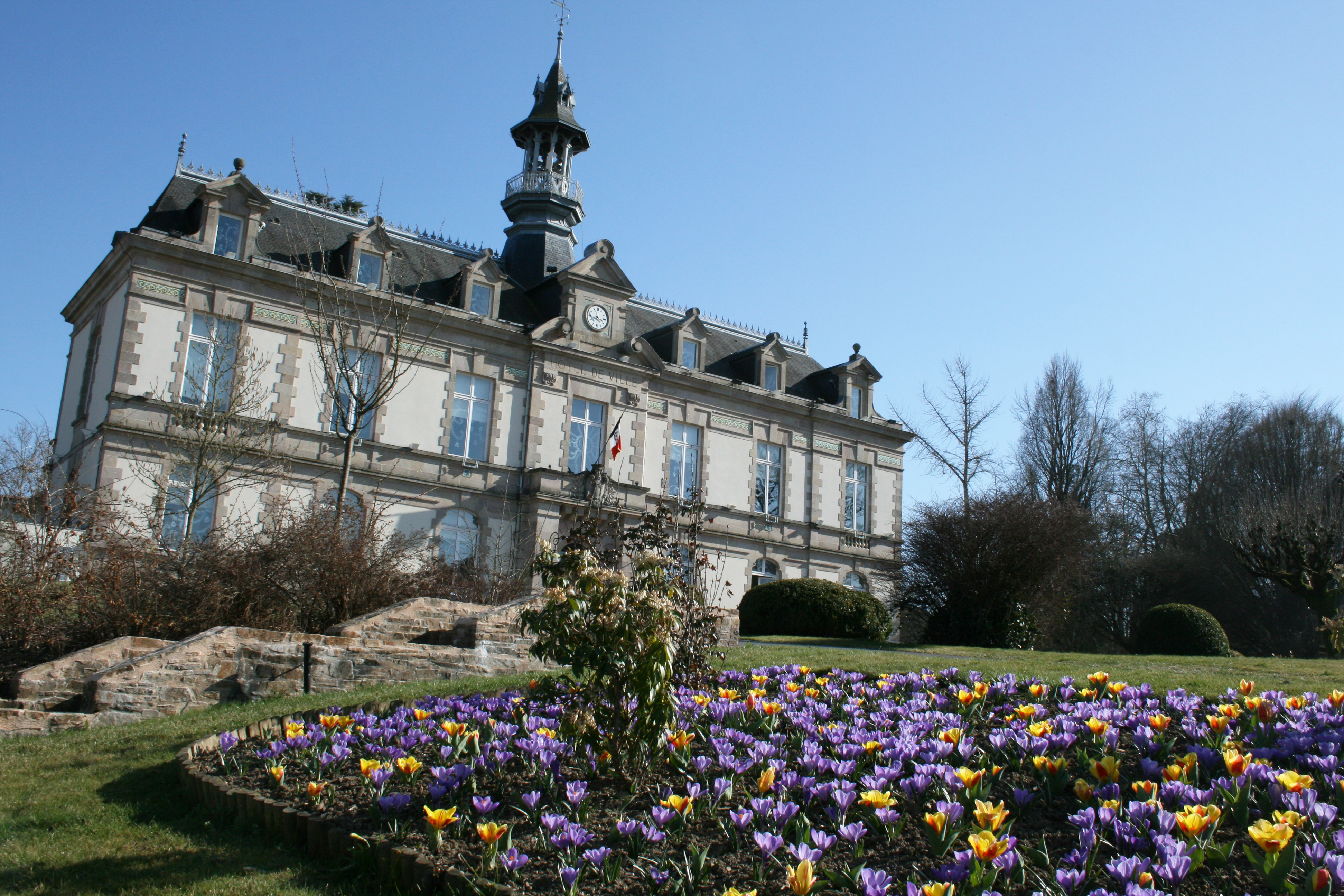 Hôtel de ville de Saint-Yrieix-la-Perche